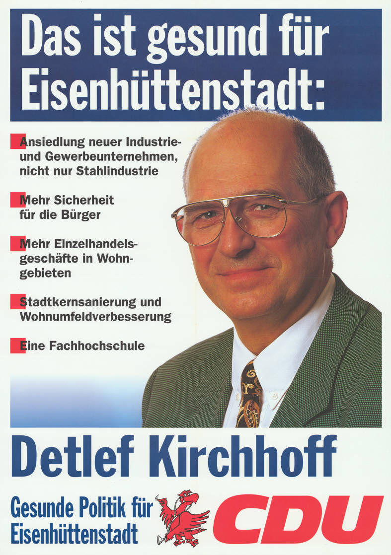 Das ist gesund für Eisenhüttenstadt: . Ansiedlung neuer Industrie- und Gewerbeunternehmen, nicht nur Stahlindustrie . Mehr Sicherheit für die Bürger . Mehr Einzelhandelsgeschäfte in Wohngebieten . Stadtkernsanierung und Wohnumfeldverbesserung . Eine Fachhochschule Detlef Kirchhoff Gesunde Politik für Eisenhüttenstadt CDU Abbildung: Porträtfoto Plakatart: Kandidaten-/Personenplakat mit Porträt Objekt-Signatur: 10-033 : 224 Bestand: Landtagswahlplakate Brandenburg (10-033) GliederungBestand10-18: Landtagswahlplakate Brandenburg (10-033) » CDU Lizenz: KAS/ACDP 10-033 : 224 CC-BY-SA 3.0 DE